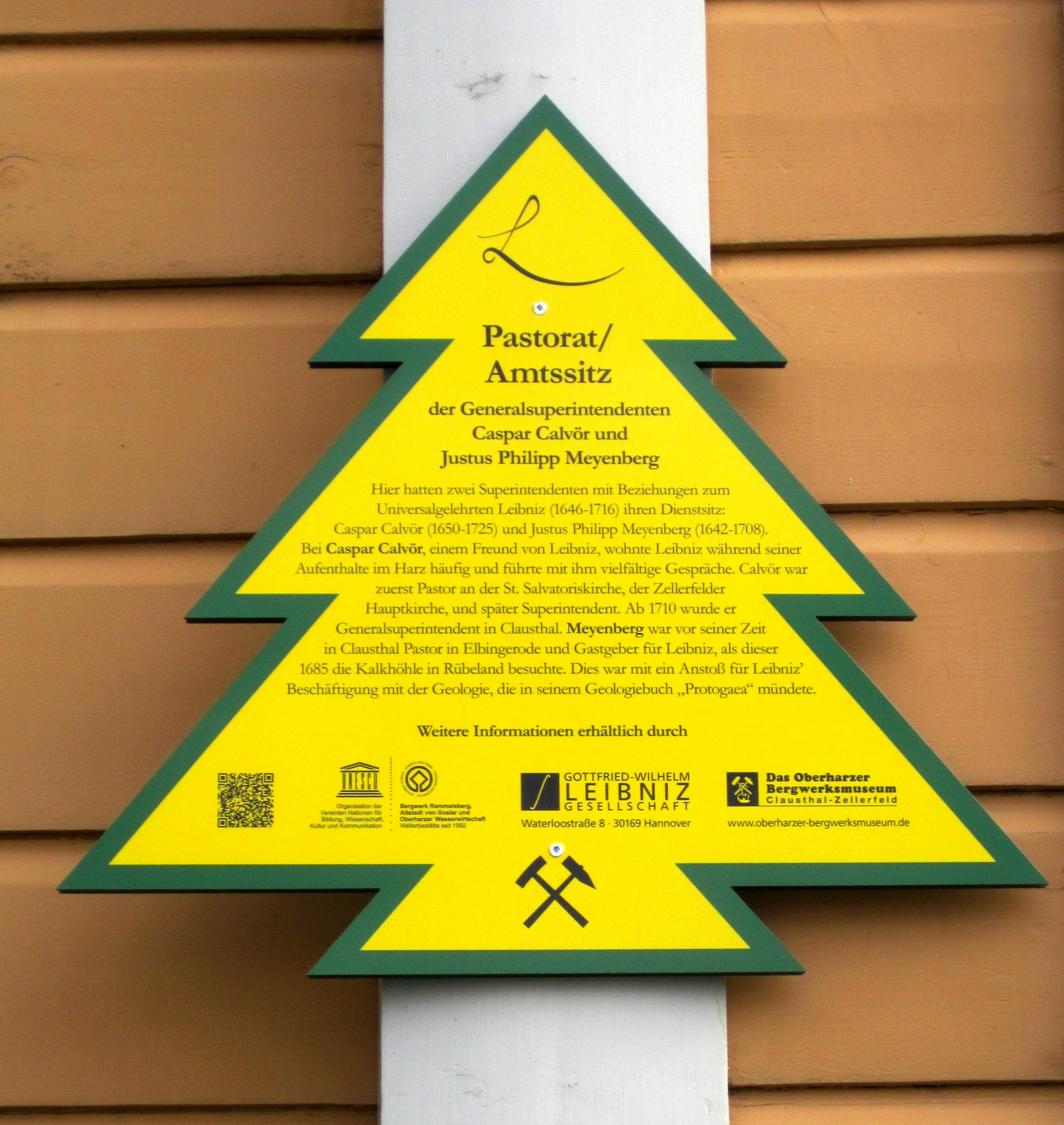 Dennerttanne am Haus des Generalsuperintendenten in Clausthal, Gemeinde Clausthal-Zellerfeld, Niedersachsen, Deutschland.